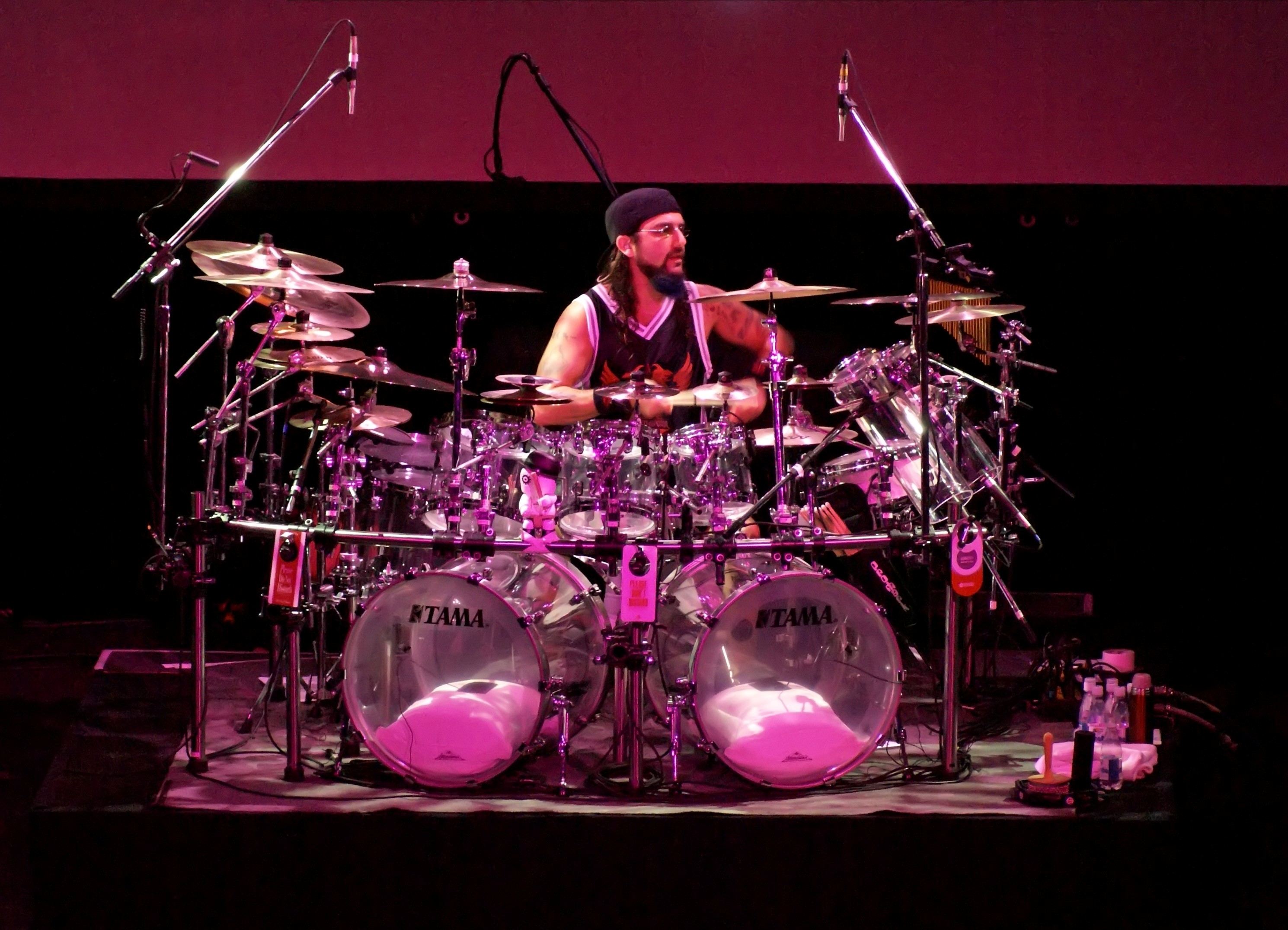 Mike Portnoy. Show Dream Theater no Rio de Janeiro dia 07/03/2008 Fotos tiradas do camarote central.